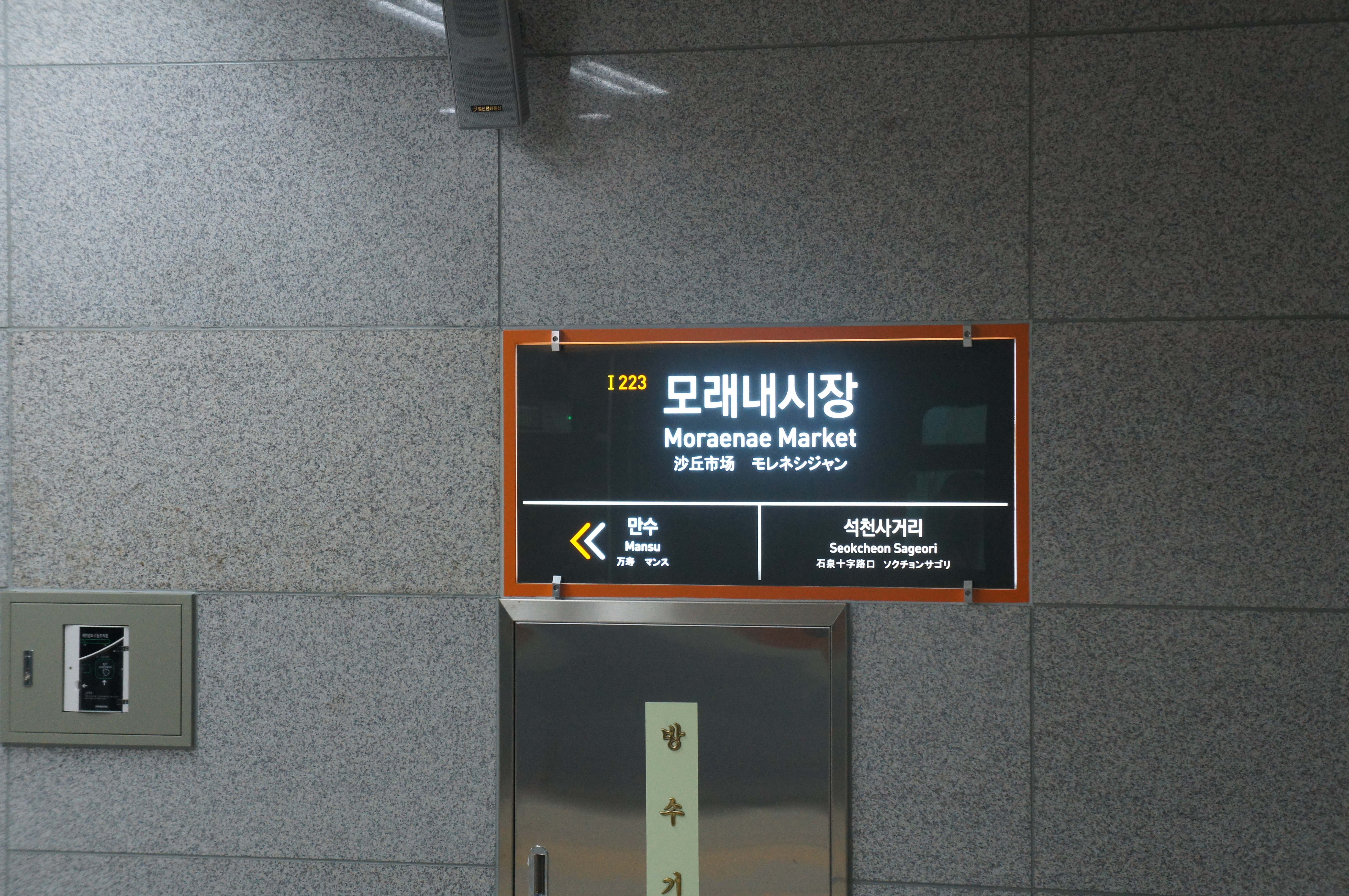 모래내시장역 역명판